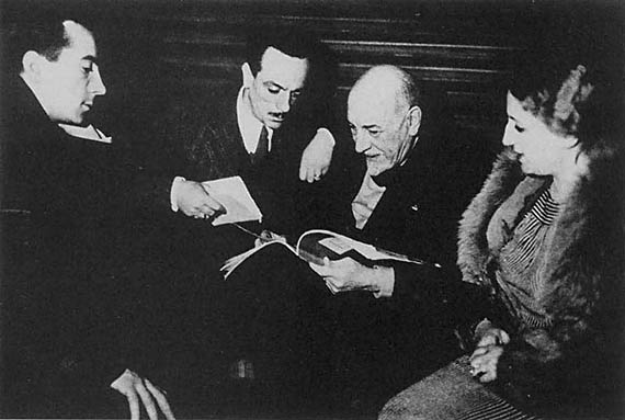 Luigi Pirandello consulta una pubblicazione con i fratelli Peppino, Eduardo e Titina De Filippo, 1936.